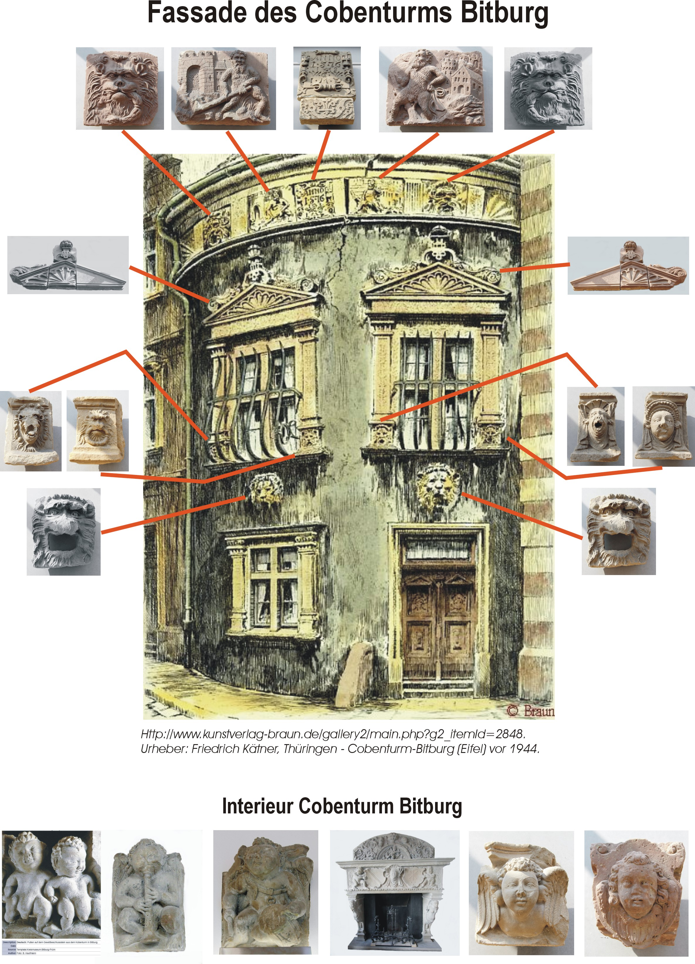 54634 Bitburg, Hauptstraße 43. Der Cobenturm war ein Wohnturm aus dem 16. Jahrhundert. Er wurde im Zweiten Weltkrieg stark beschädigt und daher 1947 abgebrochen. Architekturteile der Innenausstattung und der Fassadenreliefs befinden sich heute im Kreismuseum Bitburg-Prüm, im Rathaus und im Eingangsbereich der Stadthalle/Bitburger Markenerlebniswelt. Fotomontage von 2018.